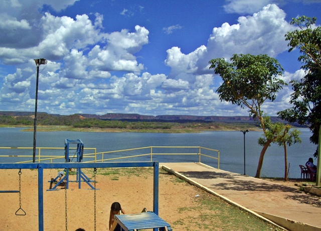 Balneário de Jenipapo